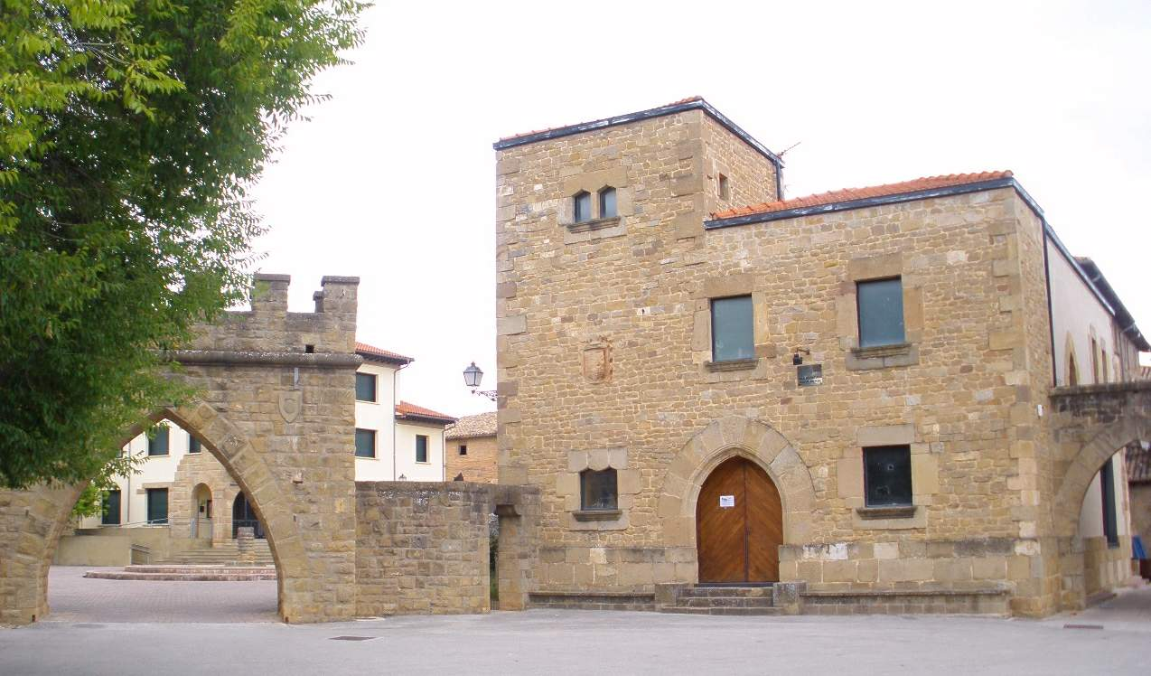 Plaza de los Fueros (Obanos, Navarra)